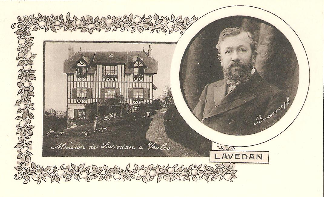 carte postale scannée